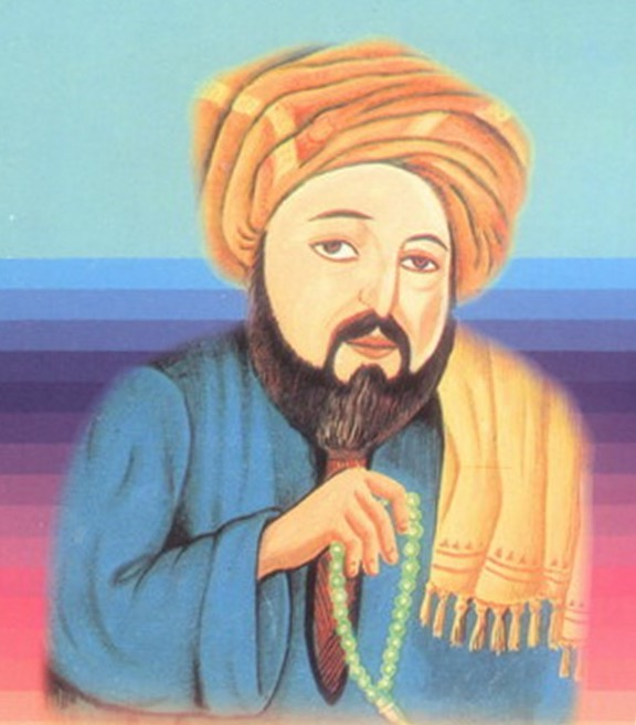 مصرى: Old image